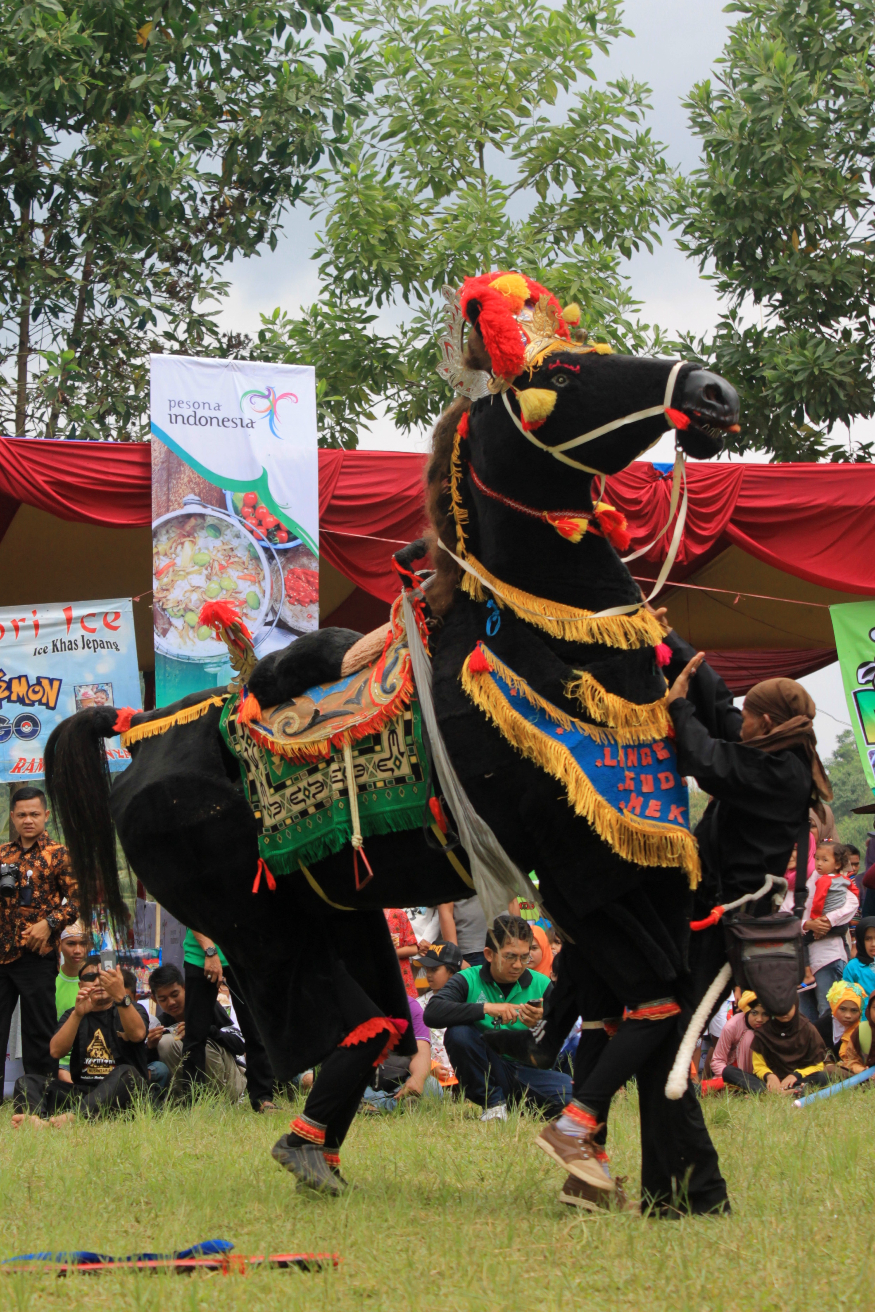 Pertunjukan kuda bajir dalam acara budaya Jayagiri Festival